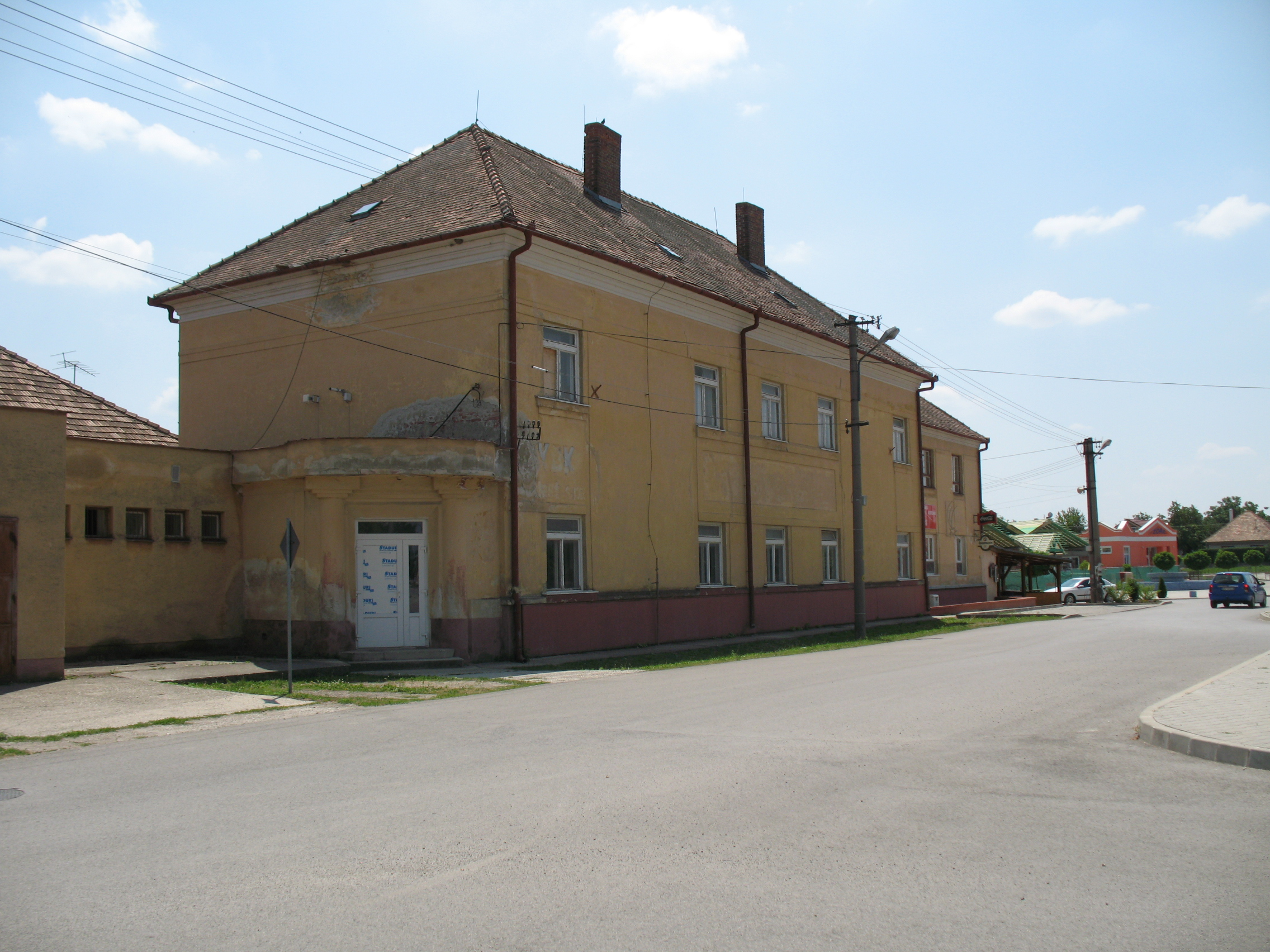 Nádszeg